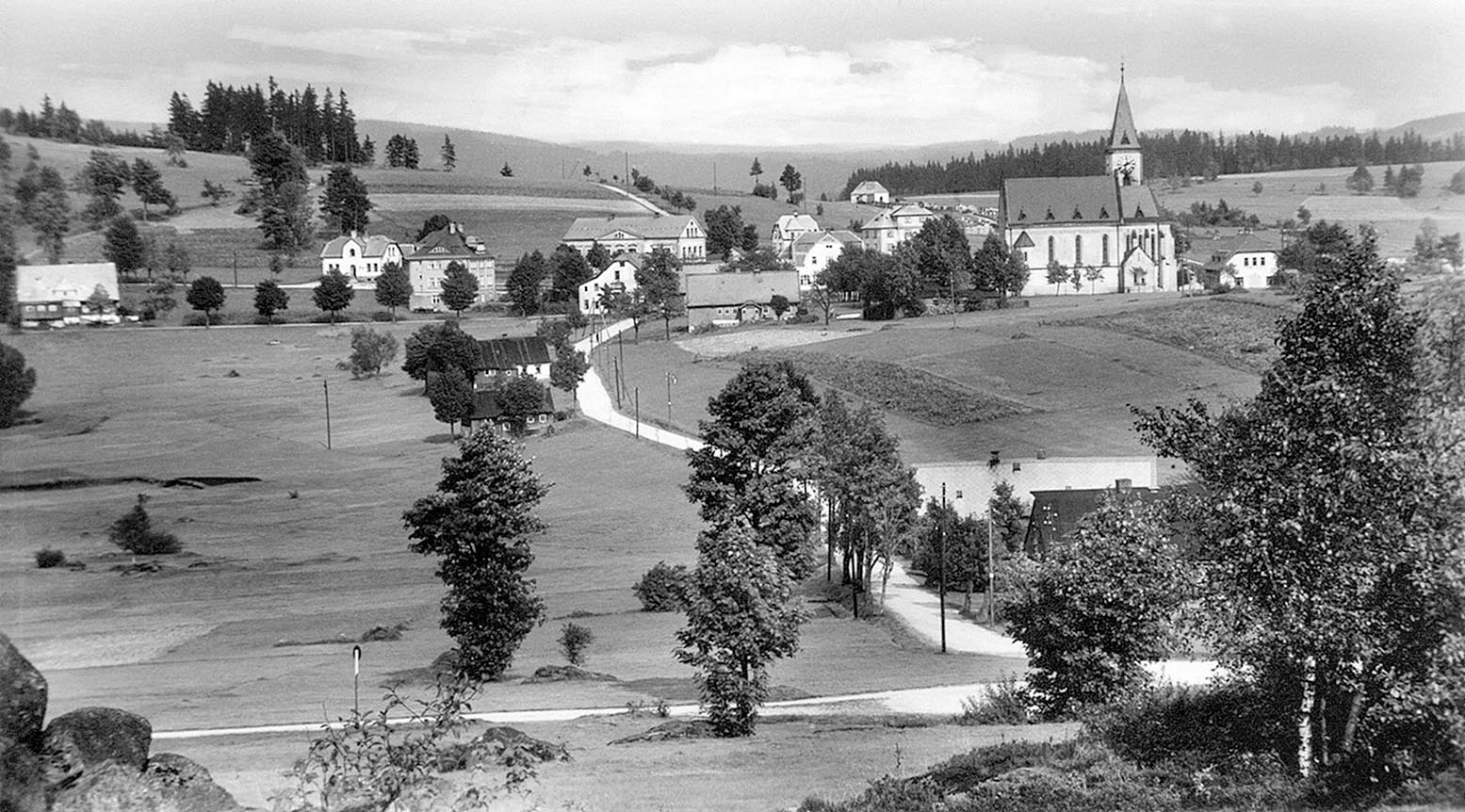 Z male strany